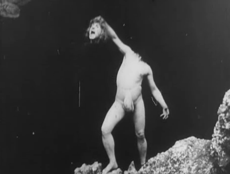 Inferno, milano films, 1911, paolo e francesca